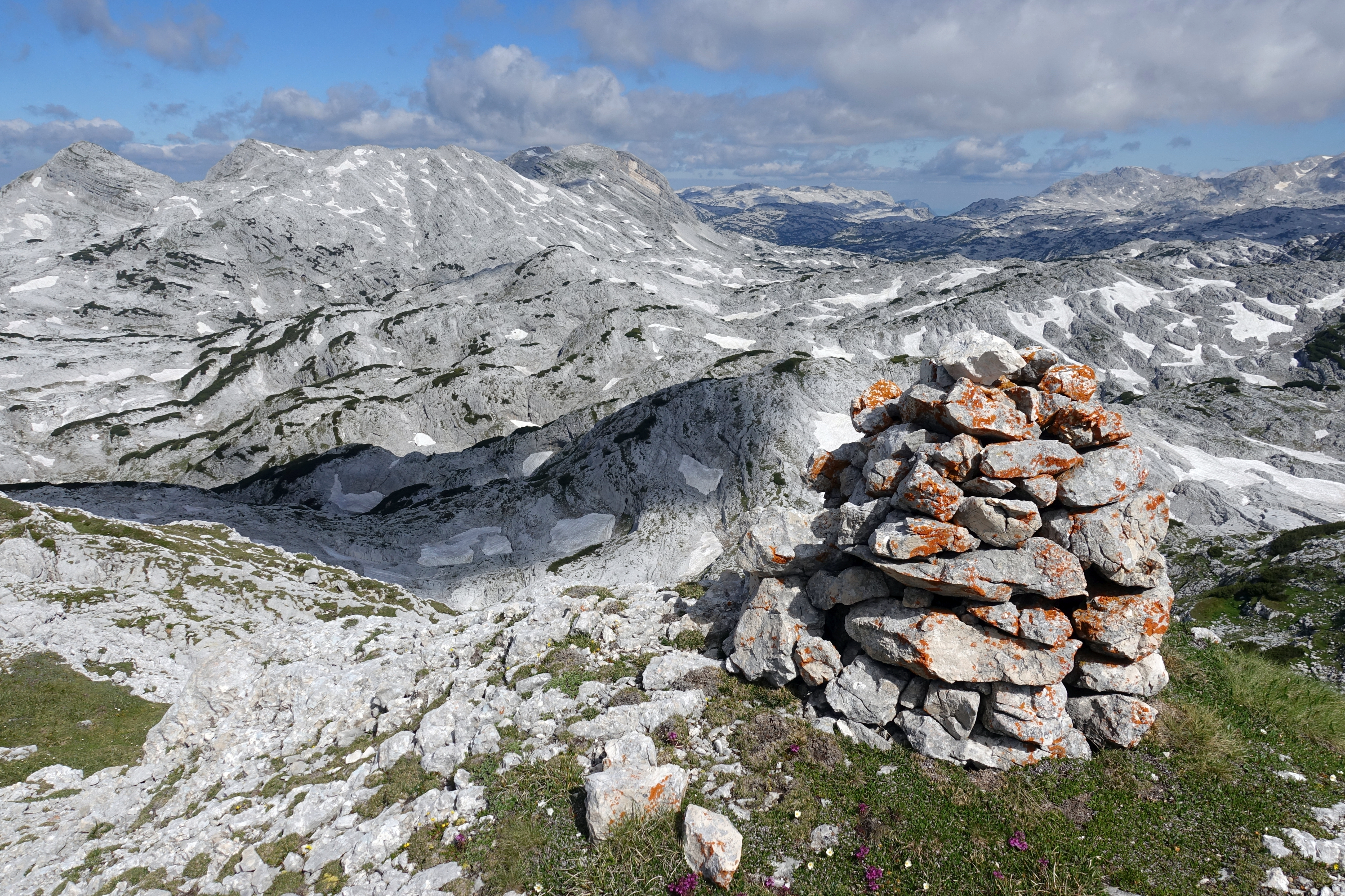 Blick vom Bartlrücken auf das Plateau der Prielgruppe im Toten Gebirge, Österreich; Im Hintergrund die Gipfel von Hochweiß, Plankamira und Weiße Wand. Naturschutzgebiet Totes Gebirge Ost (NSG 17 a), Bad Mitterndorf, Stainach-Pürgg, Wörschach, Liezen This media shows the nature reserve in Styria with the ID NSG 17 a.